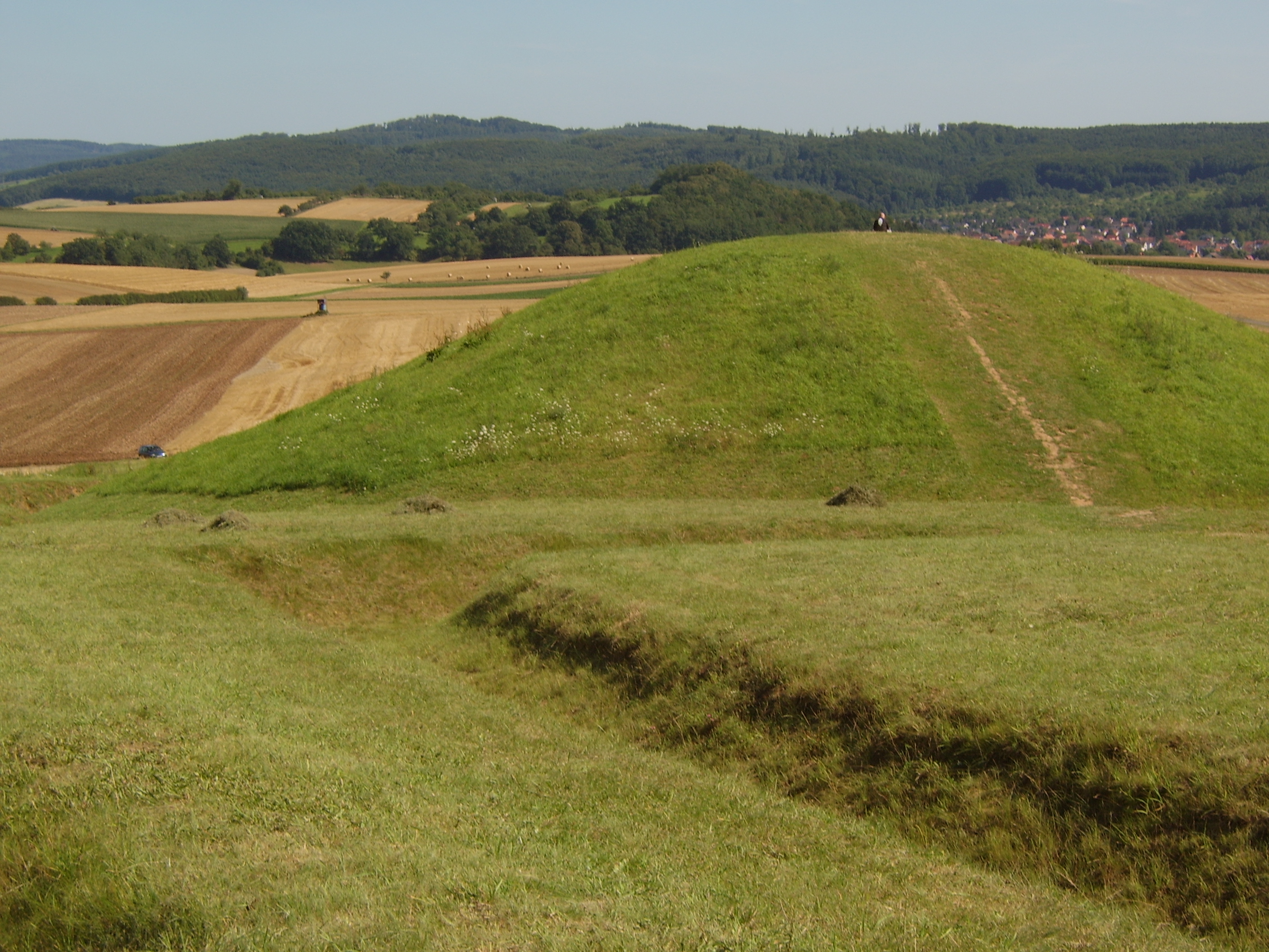 Keltischer Grabhügel auf dem Glauberg/Hessen